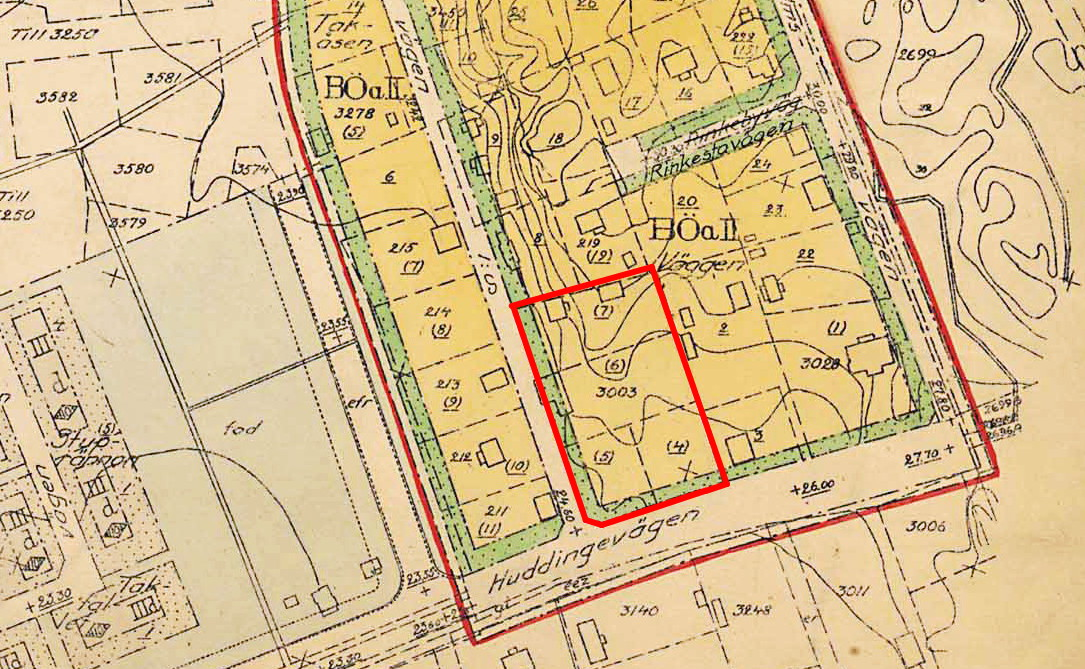 Del av stadsplan för Örby slott visande kvarteret Väggen med Villa Valdorshem